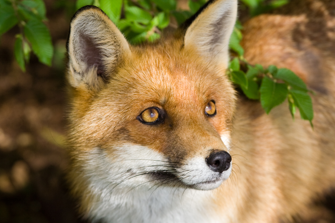 Renard roux pris près de Véron